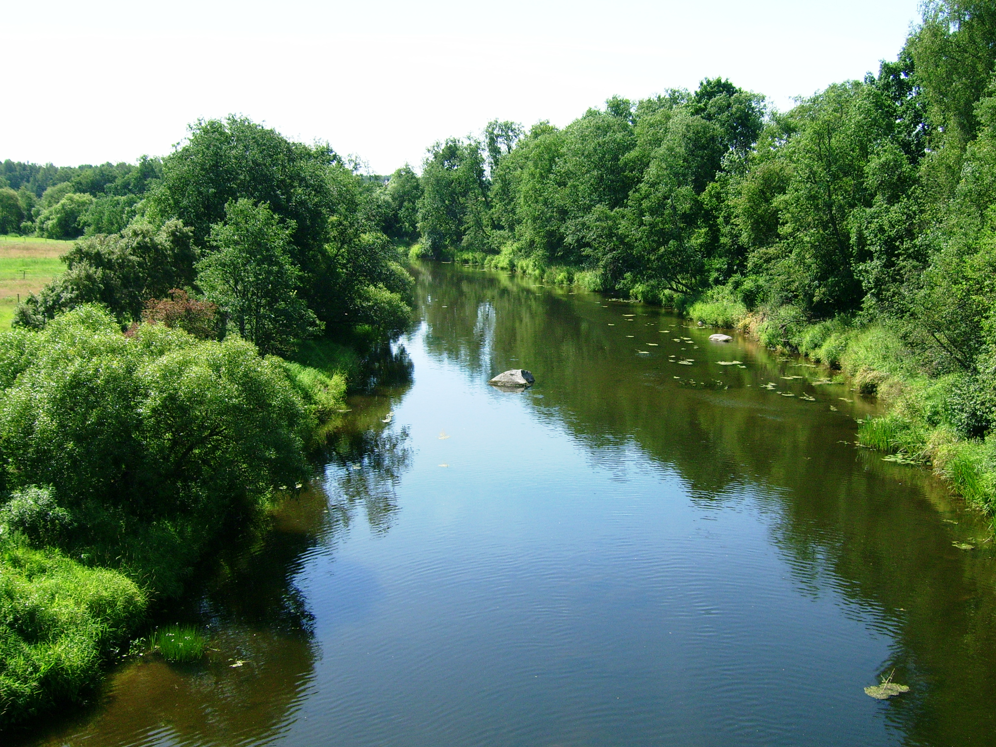 Jūra ties Pajūriu